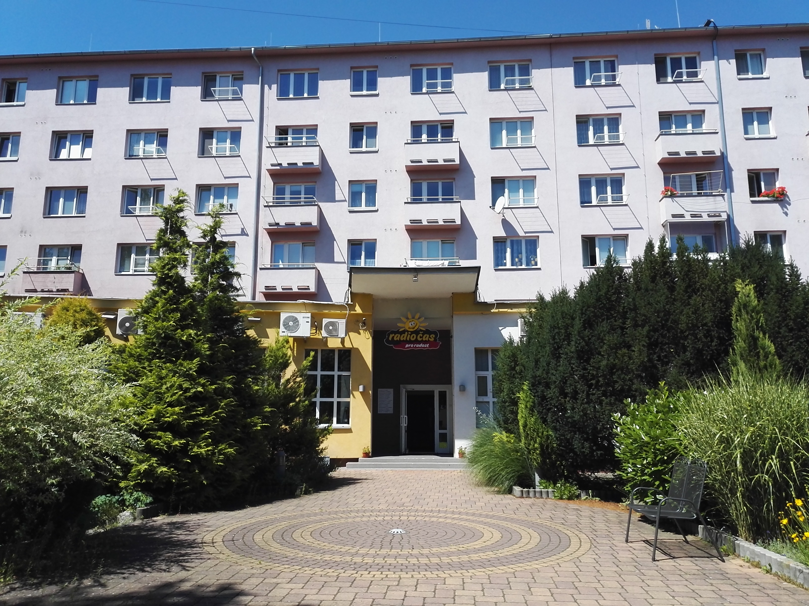 Pobočka Rádia Čas v Ostravě-Porubě